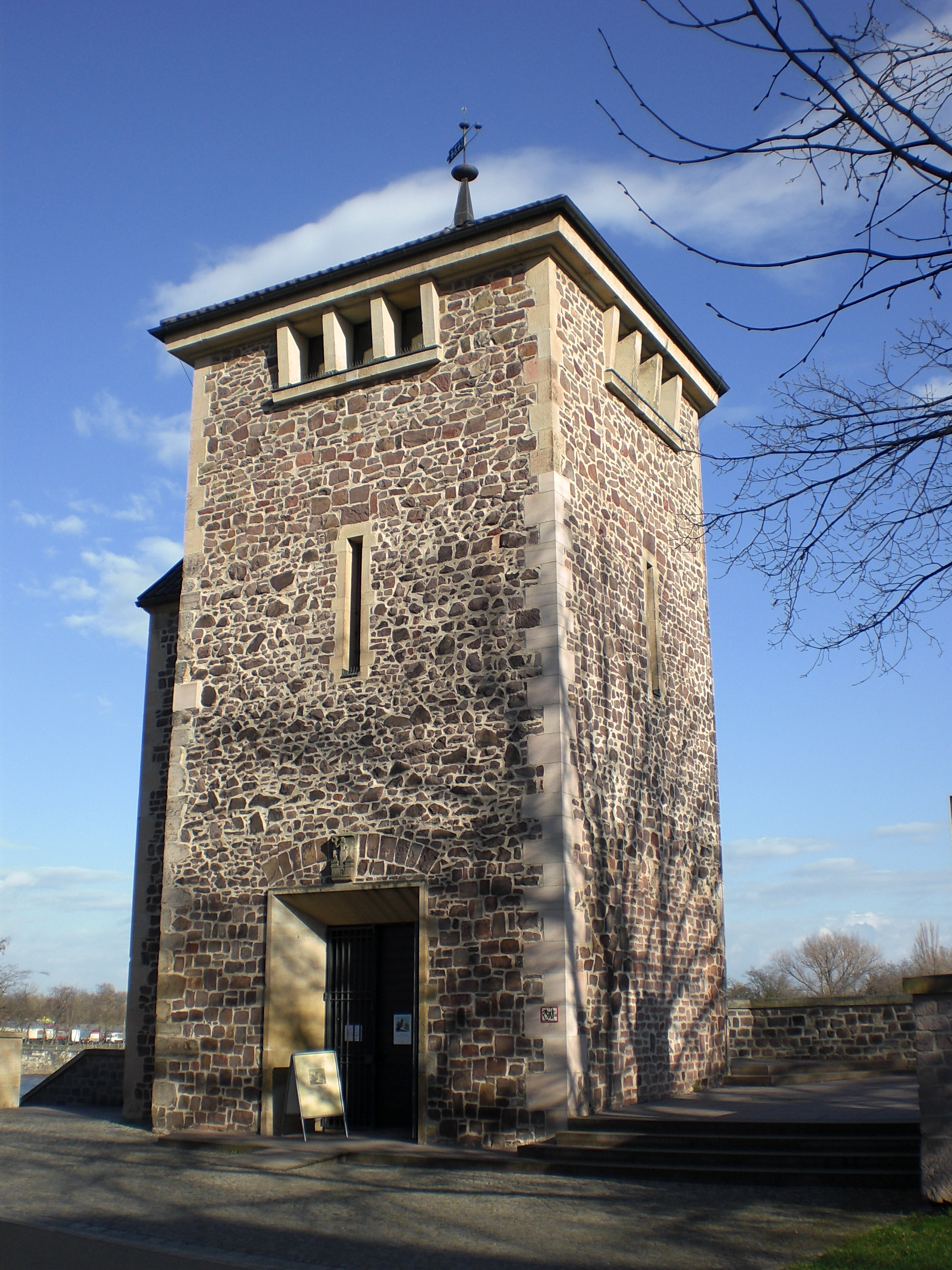 Kiek in de Köken, Wehrturm in Magdeburg, oberer Teil